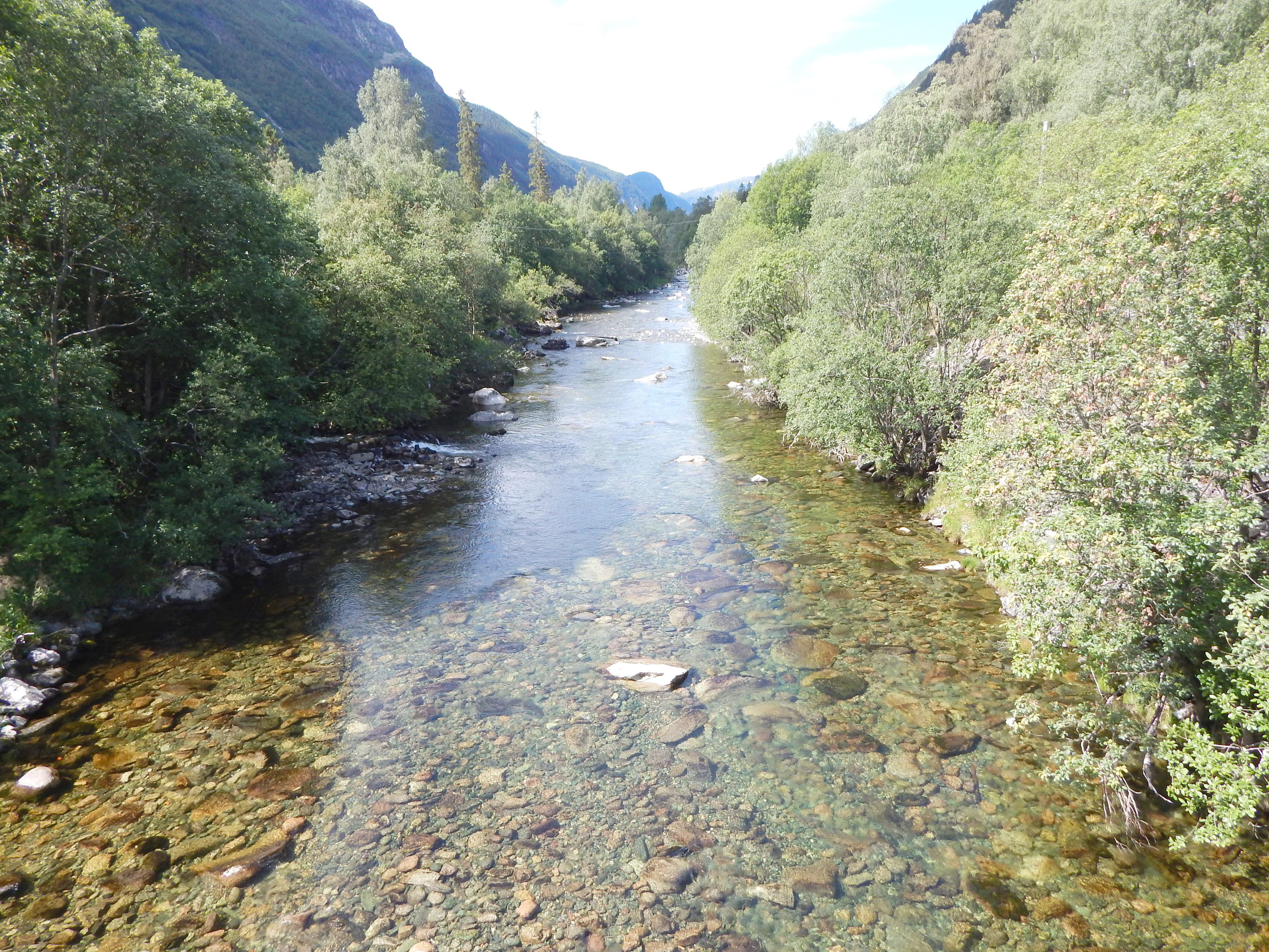 Måna ved Dale